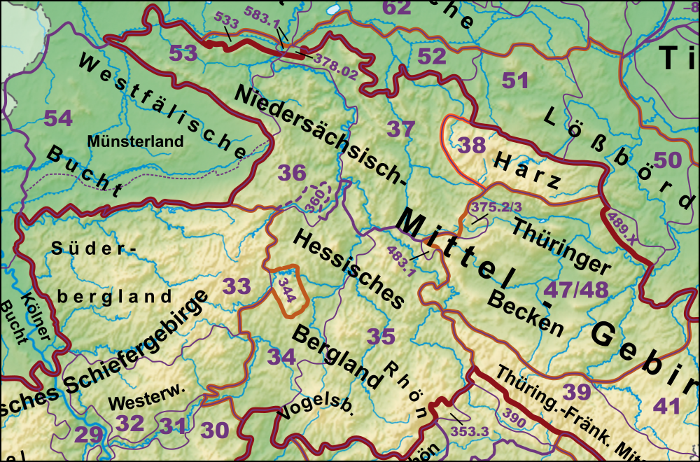 Haupteinheitengruppen der nördlichen Mittelgebirge (Niedersächsischer Bergland, West- und Osthessisches Bergland, Harz, Thüringer Becken